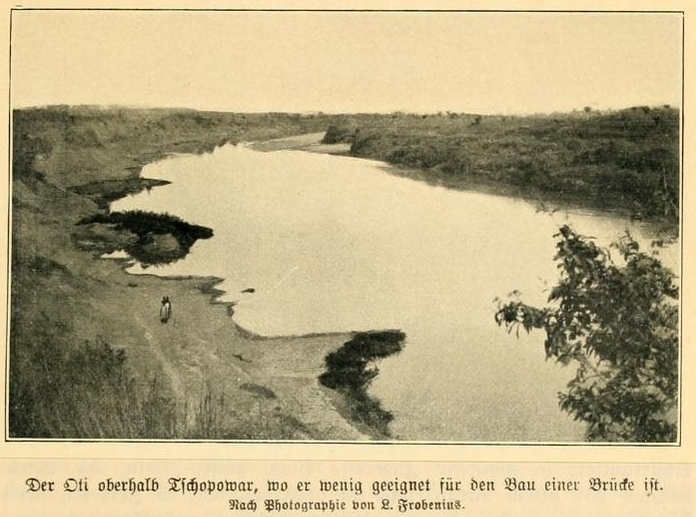 “Der Oti River oberhalb Tschopowar” - from Expeditionsbericht der Zweiten Deutschen Inner-Afrika-Expedition (1907-09) Auf dem wege nach Atlantis.